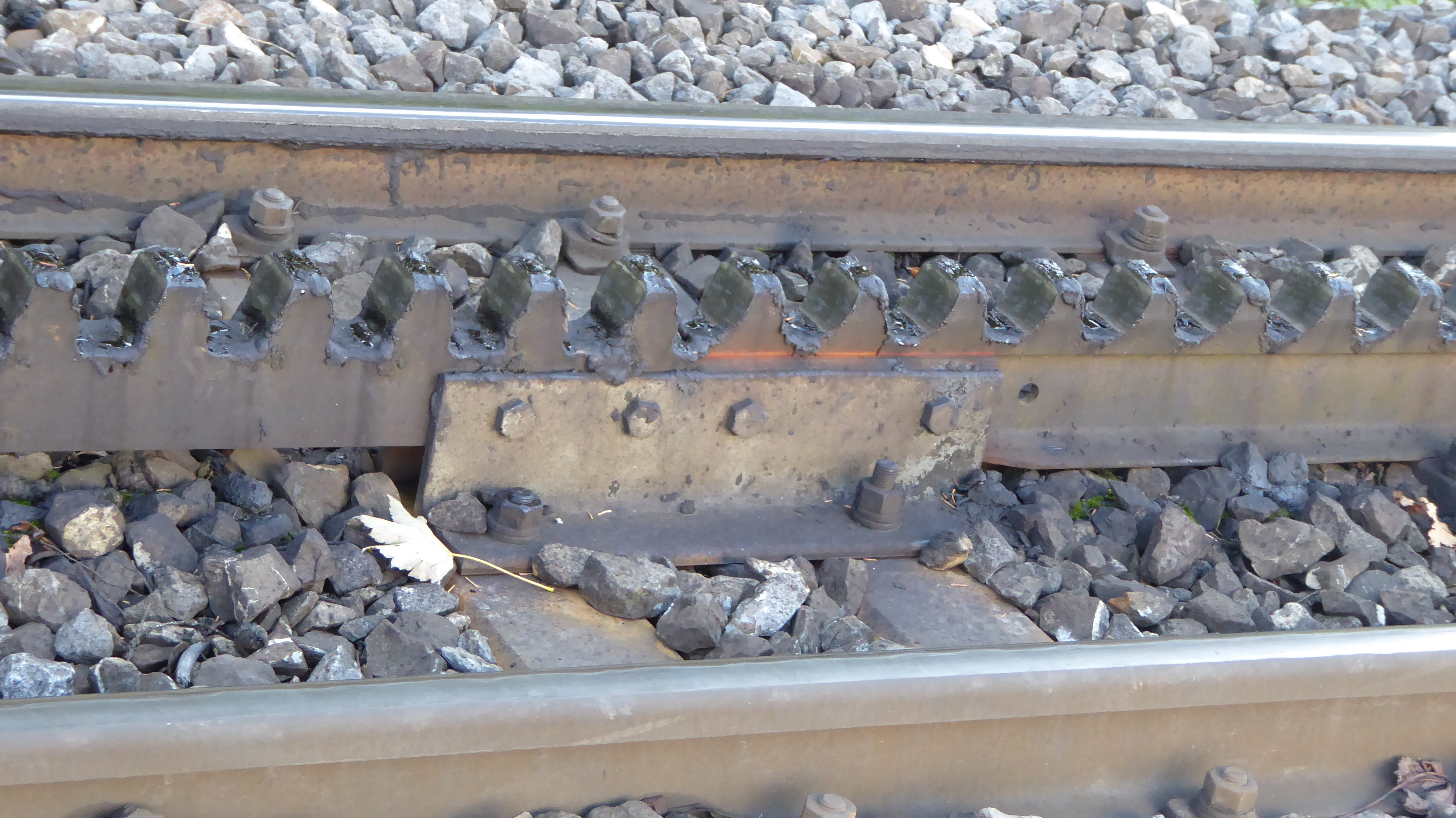 Übergang von der Von-Roll- auf die Strub-Zahnstange in der Ruckhalde, dem letzten Zahnstangenabschnitt der Strecke St. Gallen–Appenzell der Appenzeller Bahnen (AB). Bei der Strub-Zahnstange rechts im Bild ist deutlich zu erkennen, dass die Zahnstange aus einem Schienenprofil gefräst wurde. Bei der Sanierung des Streckenabschnitts im Jahr 1980 hatte die damalige Eigentümerin, die St. Gallen-Gais-Appenzell-Altstätten-Bahn (SGA), Schwierigkeiten bei der Beschaffung der geeigneten Zahnstangen. Die Strub-Zahnstangen stammten als Occasion von der Bergbahn Luchon–Superbagnères. Auf dem obersten Abschnitt wurden auf einer Länge von 234 Meter neue Zahnstangen vom Typ Von Roll eingebaut. Josef Hardegger: 100 Jahre Gaiserbahn, 1889–1989. Verlag Schläpfer, Herisau 1989, ISBN 3-85882-063-6. Seite 113